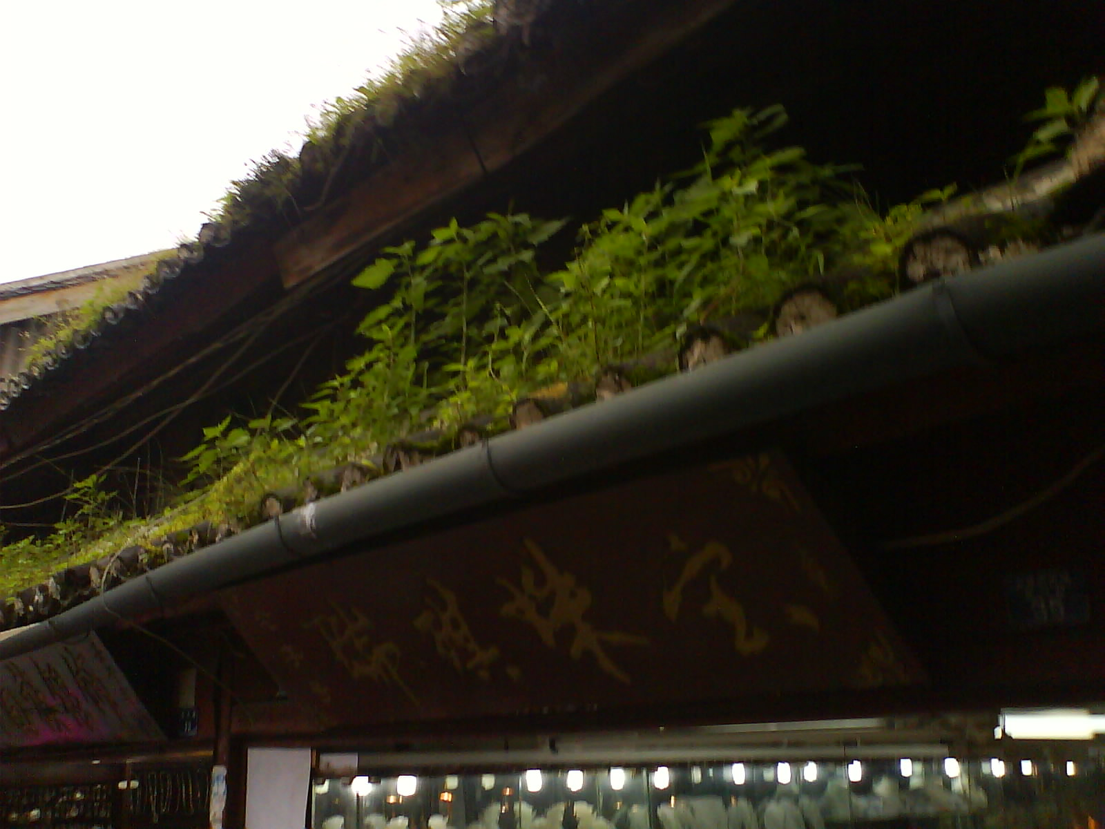 Toit végétal dans le vieux Dali (大理), dans la province du Yunnan, en Chine